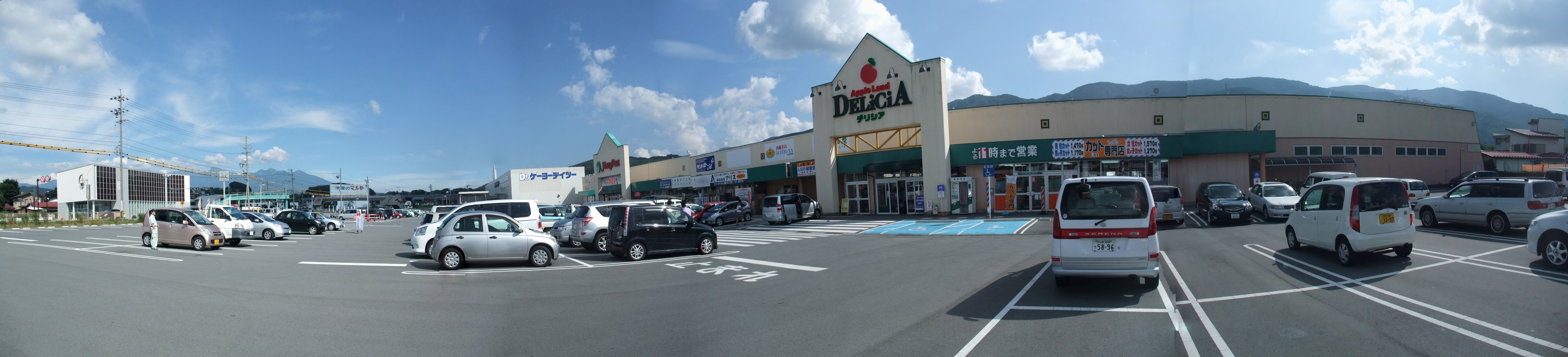 デリシア宮川メリーパーク店